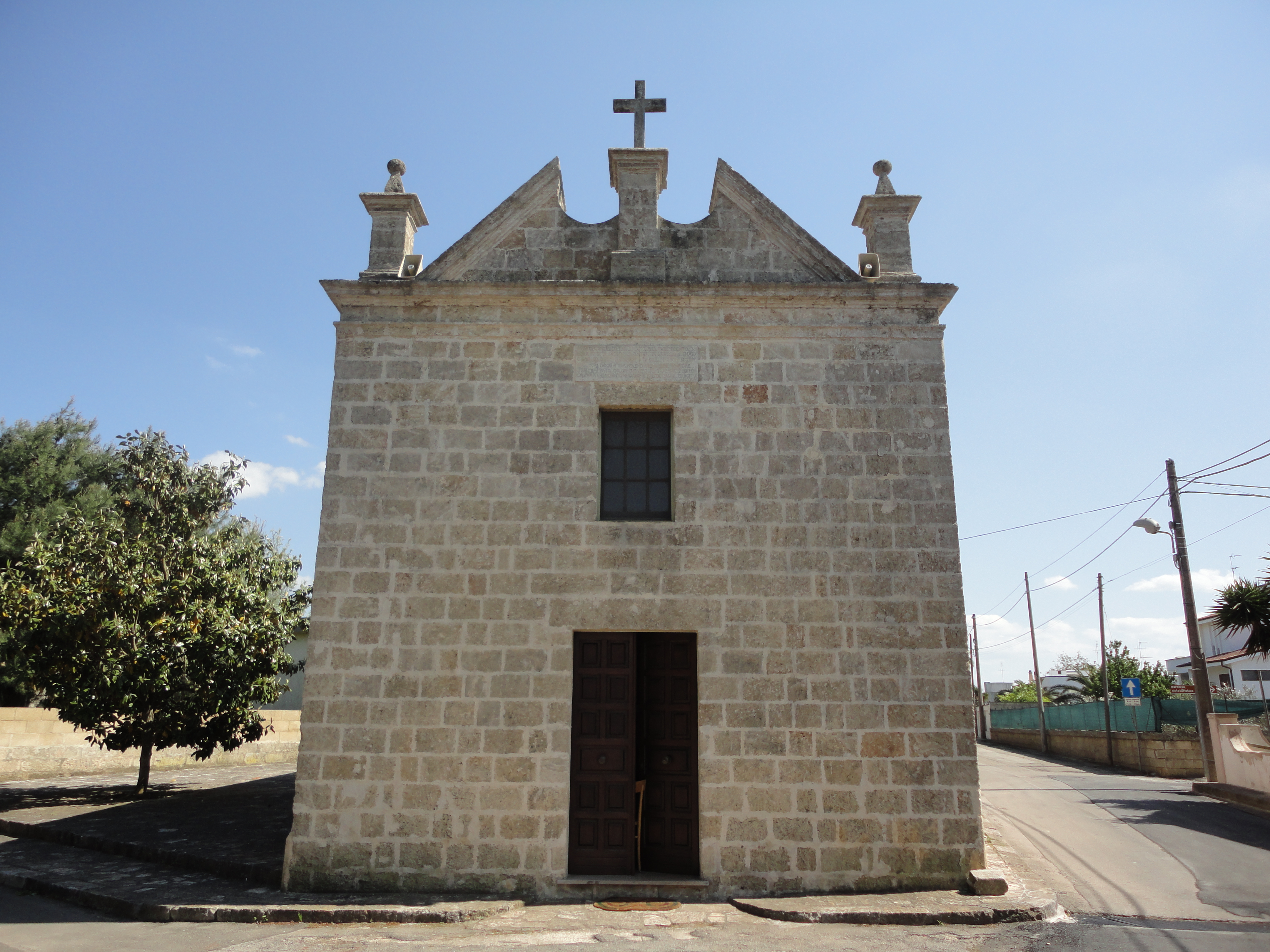 Chiesa di Santa Croce Lucugnano, Lecce